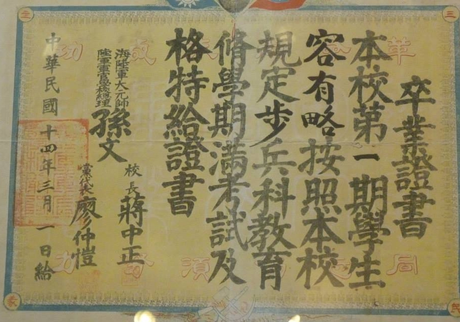 1925年3月1日黃埔軍校畢業證書